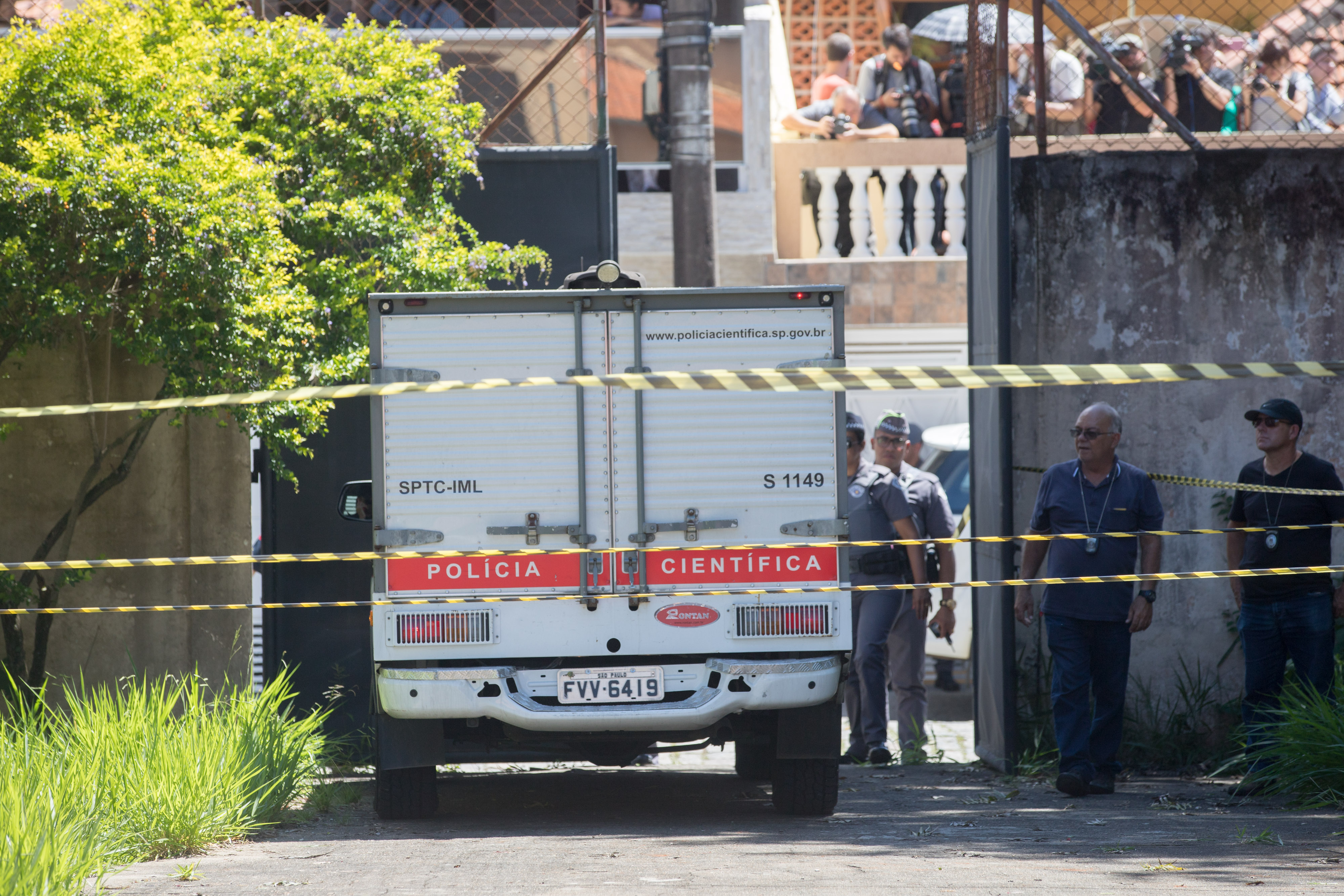 Secretários da Segurança Pública, participam de coletiva de imprensa na Escola Raul Brasil. Local: São Paulo/SP.Data: 13/03/2019 Foto: Governo do Estado de São Paulo